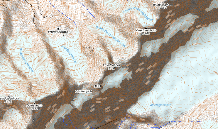 carte réalisée sur umap This map may be incomplete, and may contain errors. Don't rely solely on it for navigation.